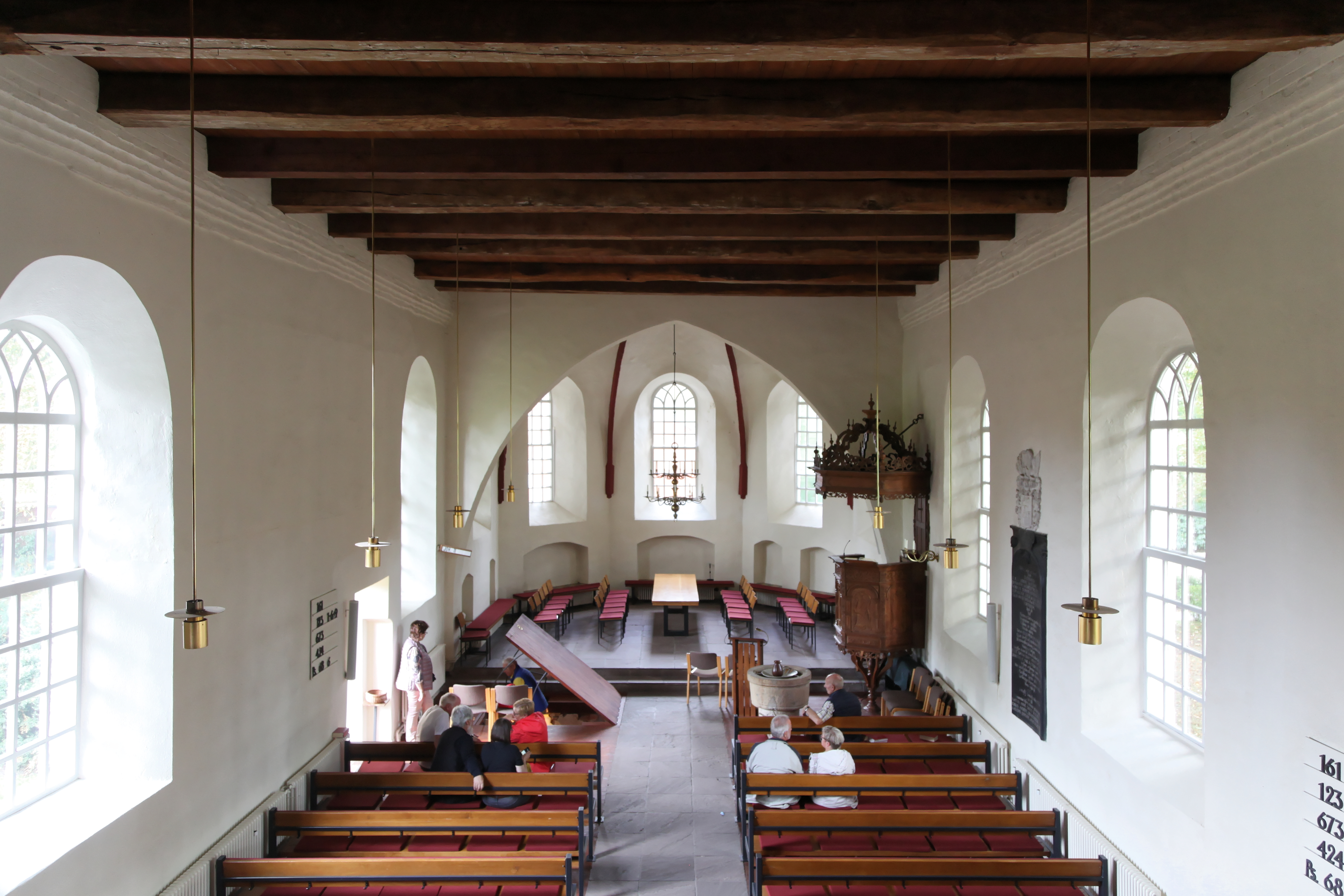 Reformierte Kirche (Loga), Am Schlosspark in Leer (Ostfriesland)